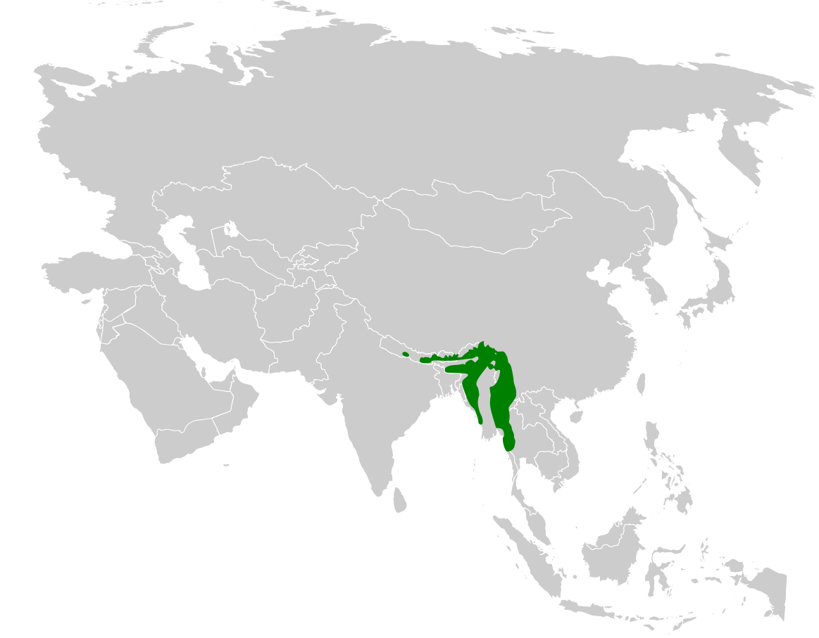 Alophoixus flaveolus distribution map, based on